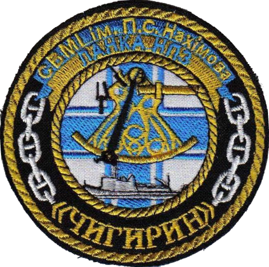 (U540) Чигирин. Емблема катера «Чигирин» Військово-Морських Сил Збройних Сил України (варіант 1)